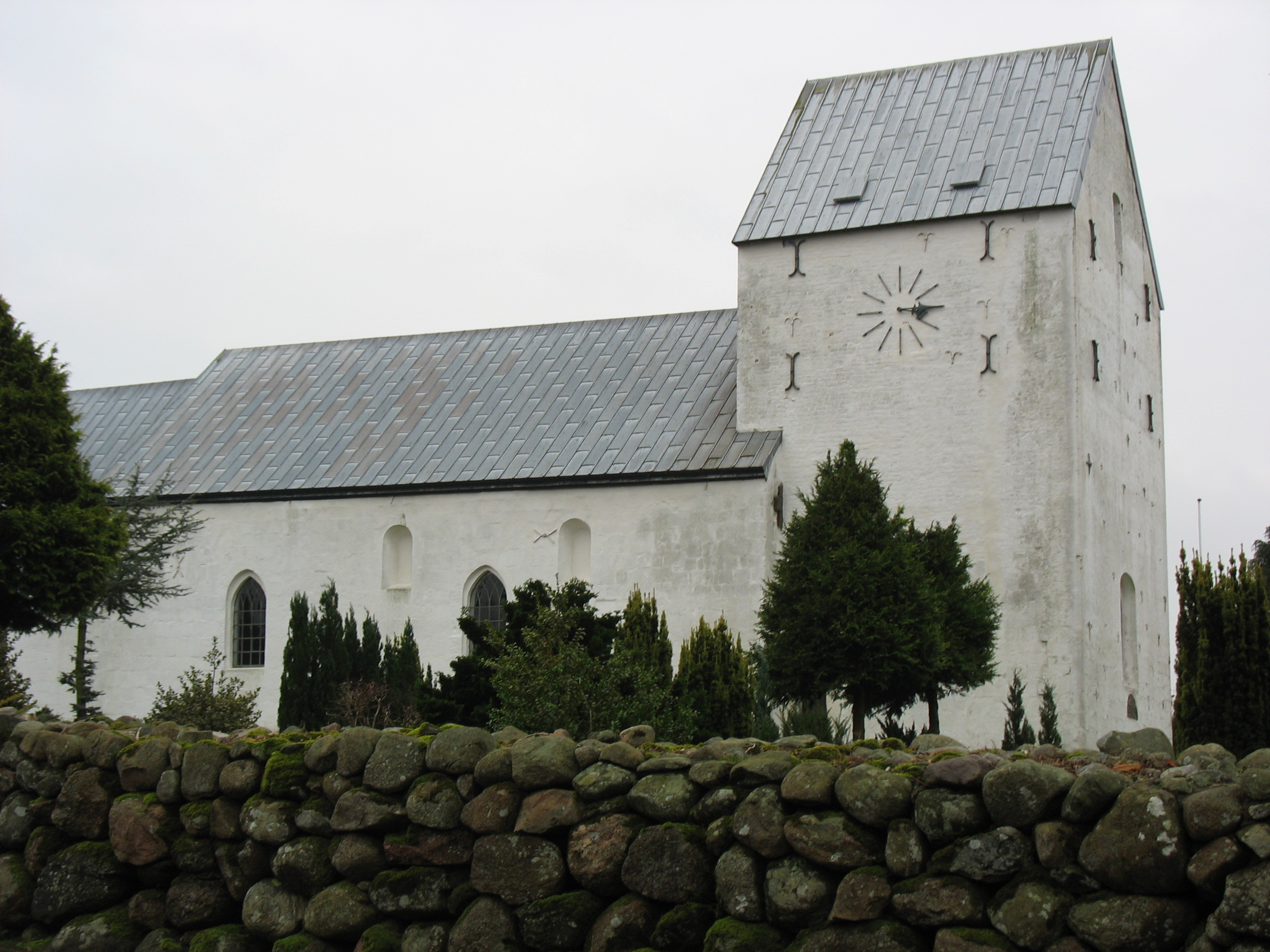 Nørre Snede kirke ligger i Nørre Snede Sogn, i Ikast-Brande Provsti (Århus Stift). Sognet ligger i Ikast-Brande Kommune (tidligere Nørre-Snede Kommune); indtil Kommunalreformen i 1970 lå det i Vrads Herred (Skanderborg Amt).